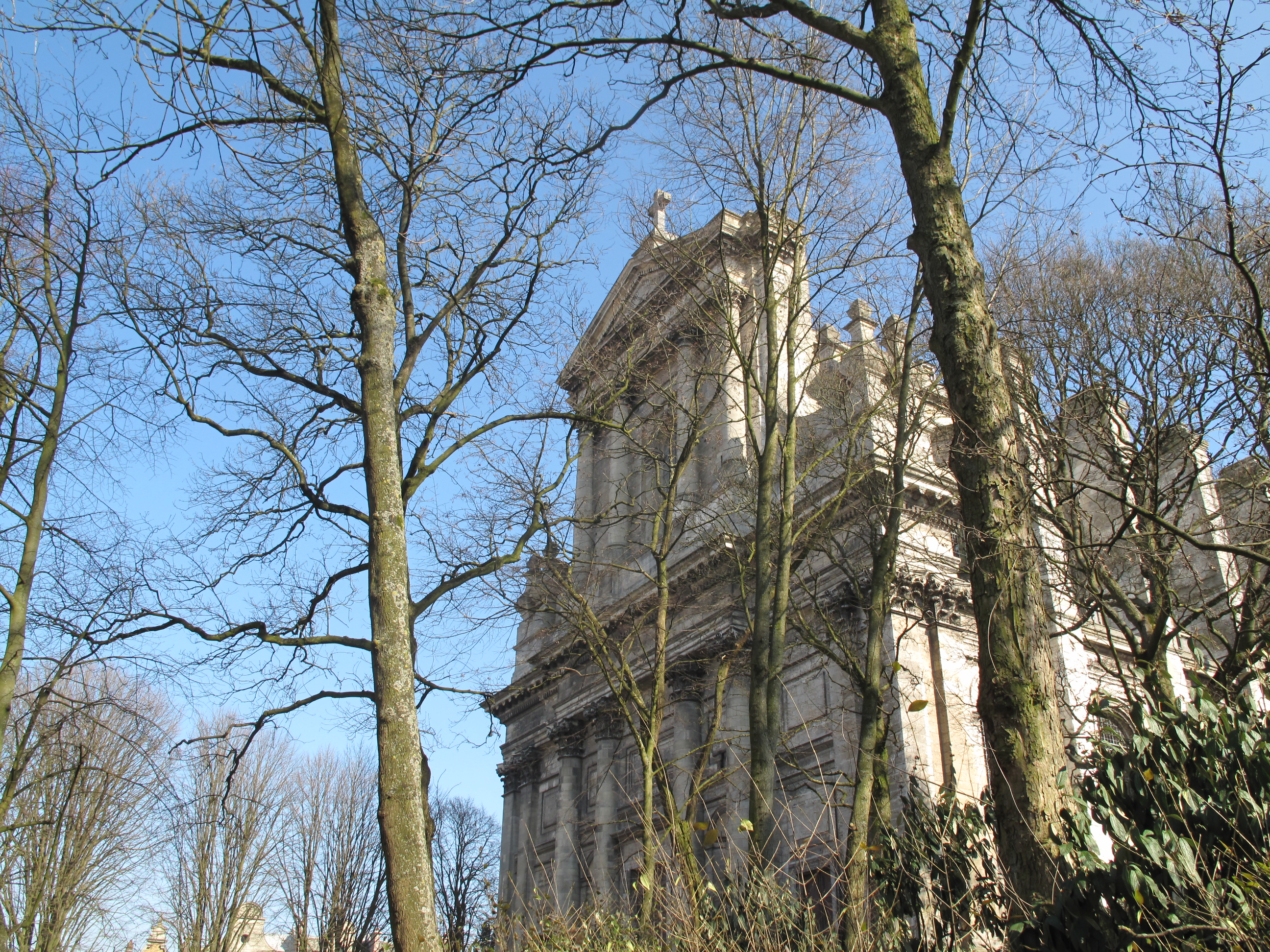 Ancienne église de l'abbaye de Saint-Waast - Ville d'Arras .